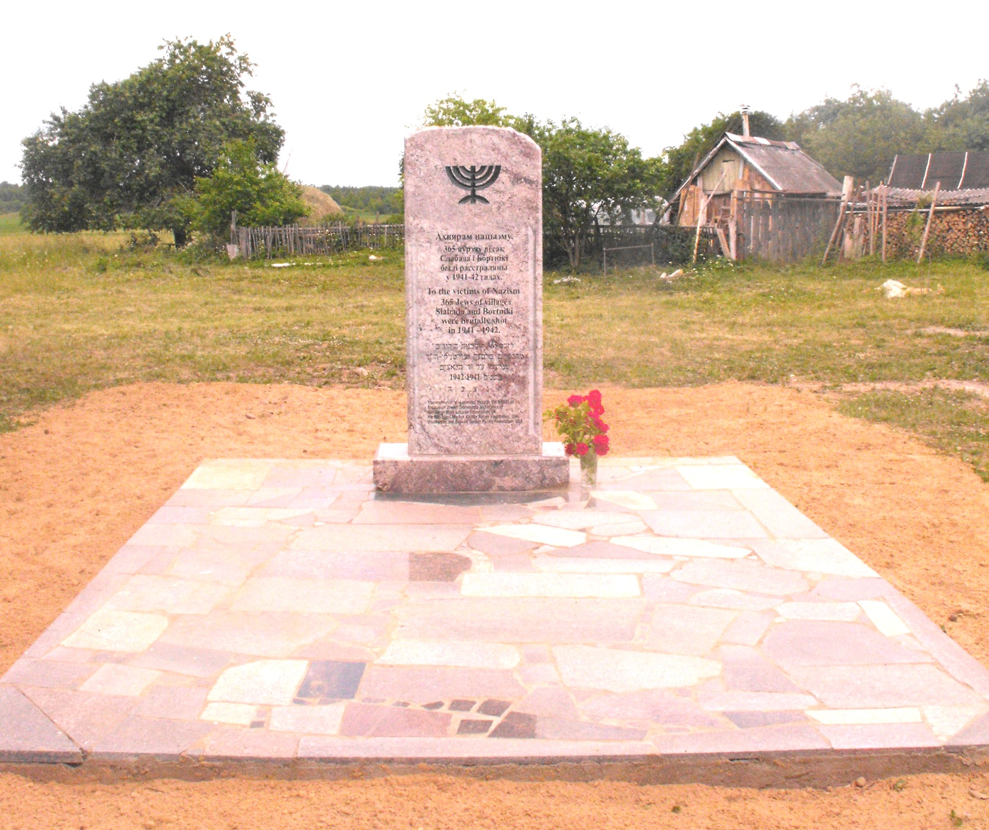 Памятник убитым нацистами евреям гетто деревни Слобода Улльского сельсовета. Открыт 21 июня 2015 года.